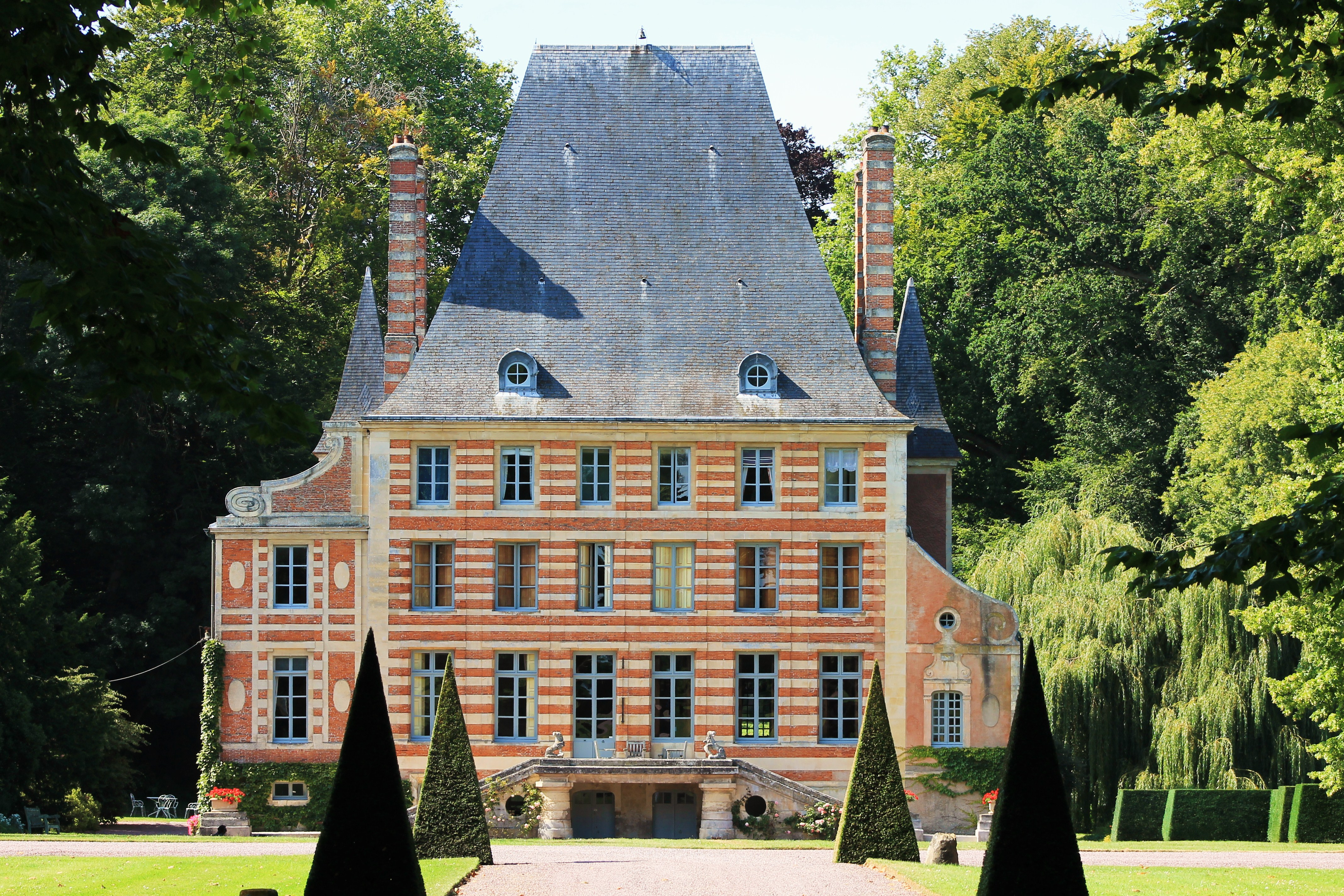 Château de Béneauville à Bavent (Calvados)